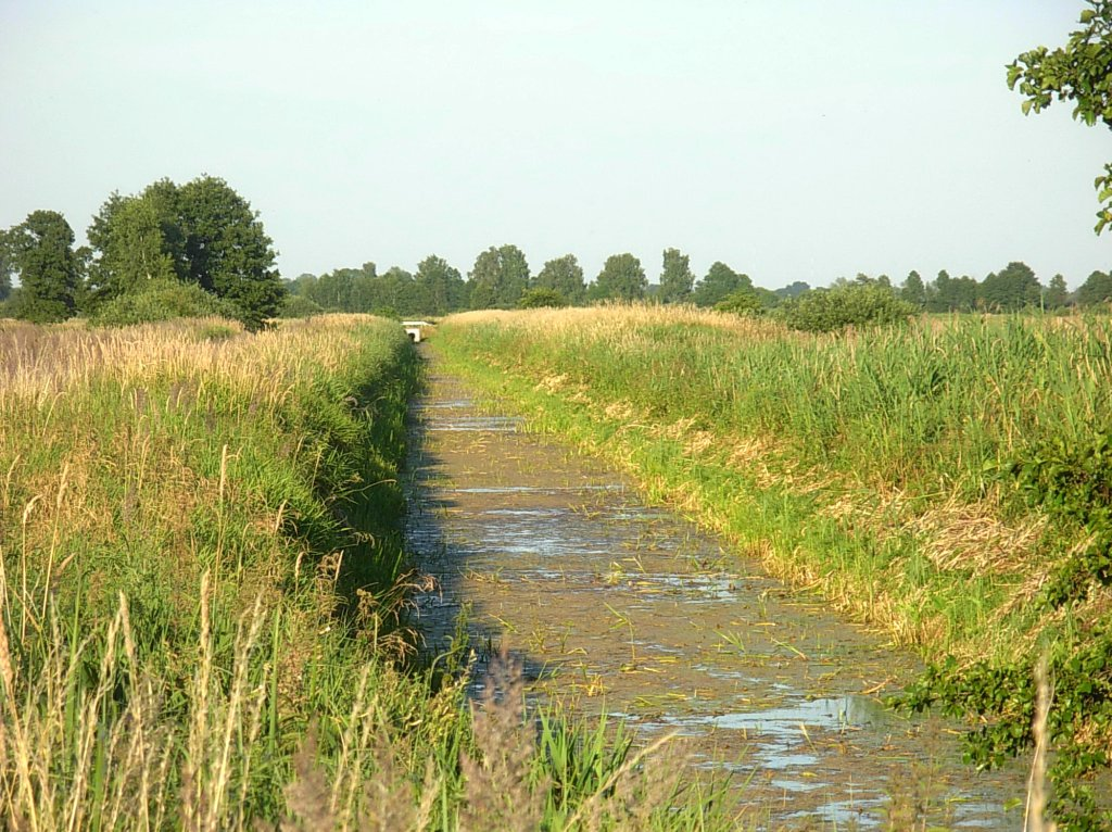 Bydgoskie Łąki Nadnoteckie